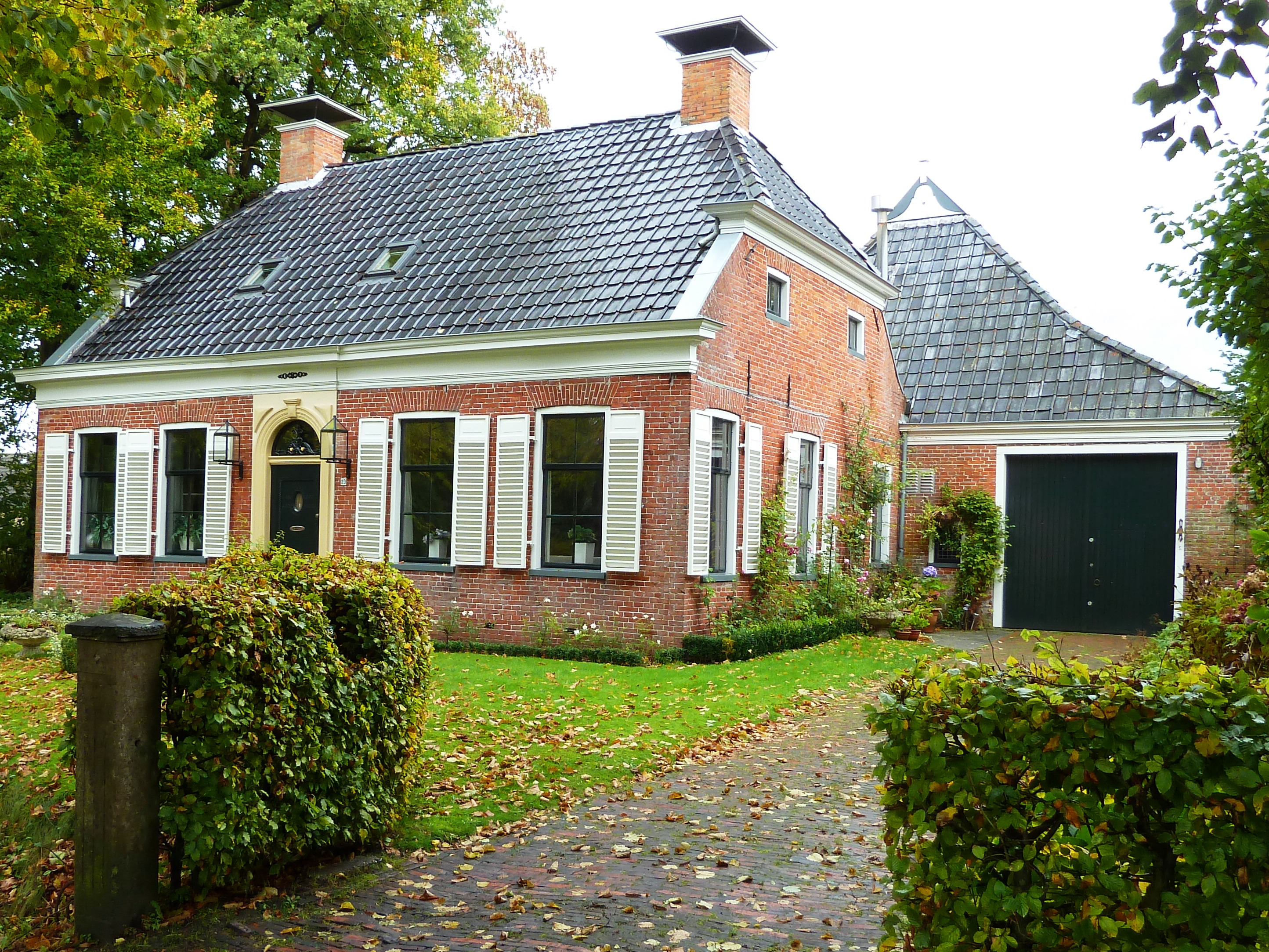 Bellingeweer 23 in het Groningse dorp Winsum